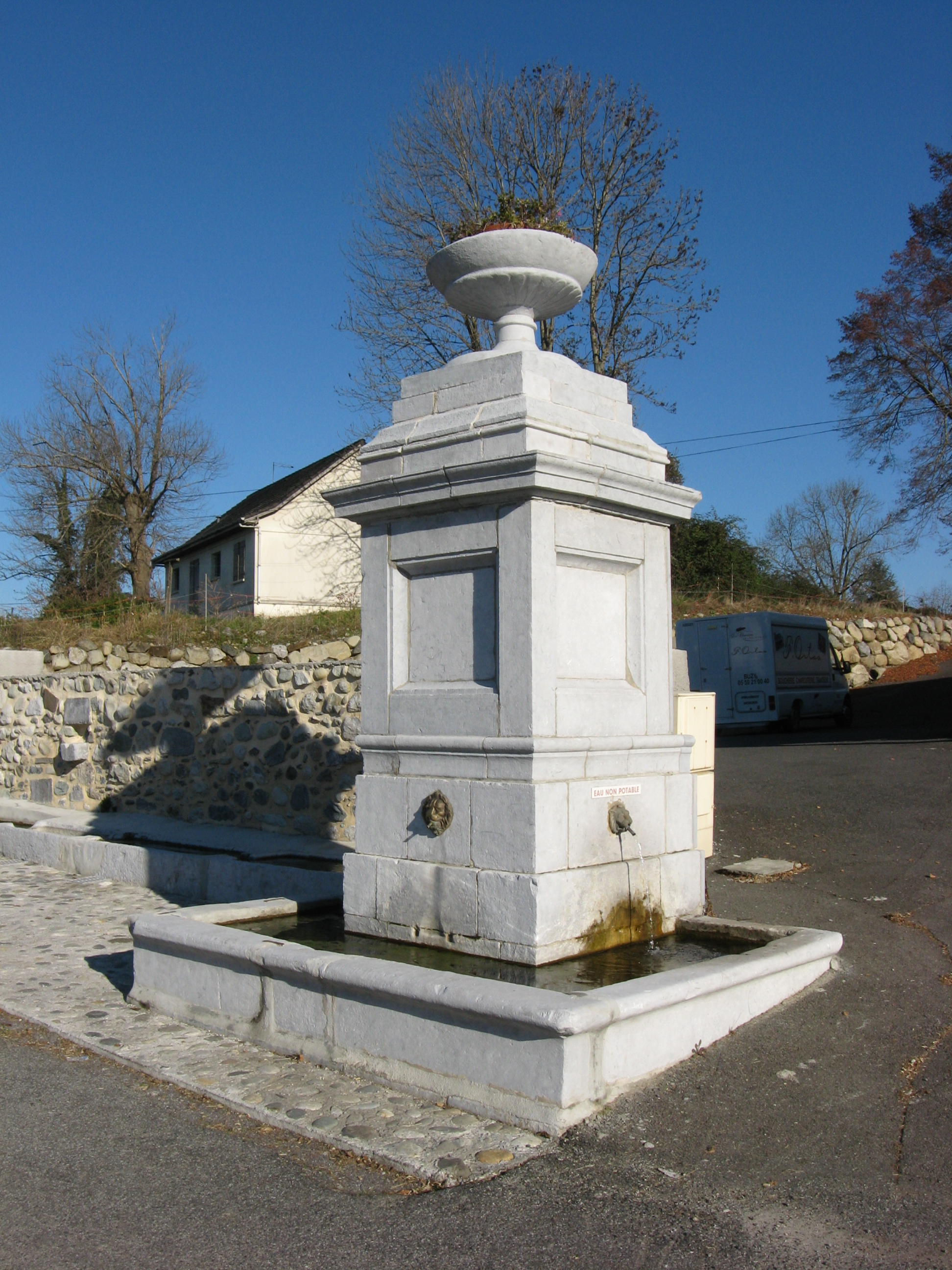 Fontaine face à la mairie de Buzy (Pyrénées-Atlantiques) (Pyrénées).